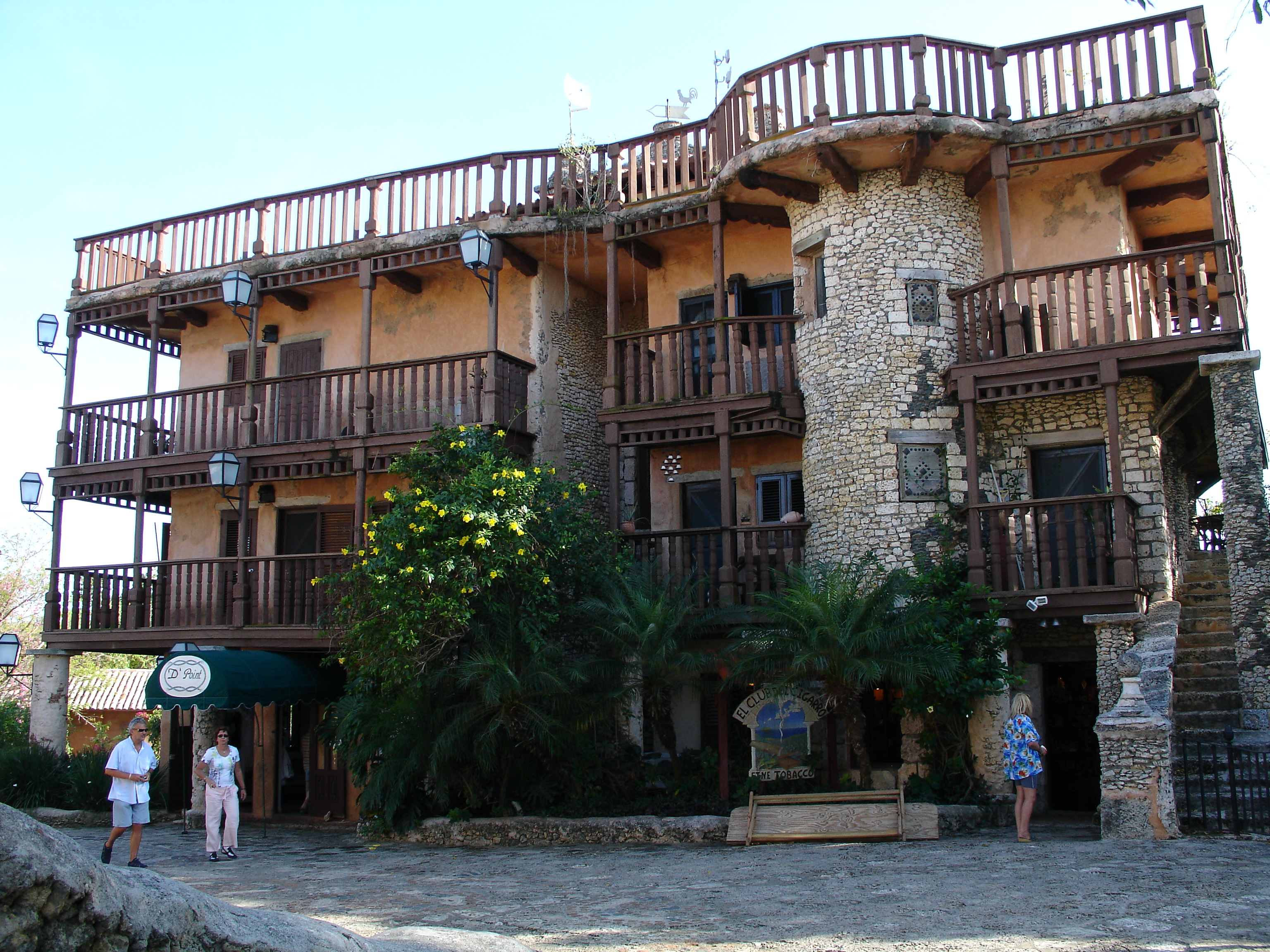 Altos de Chavon, Dominikanische Republik